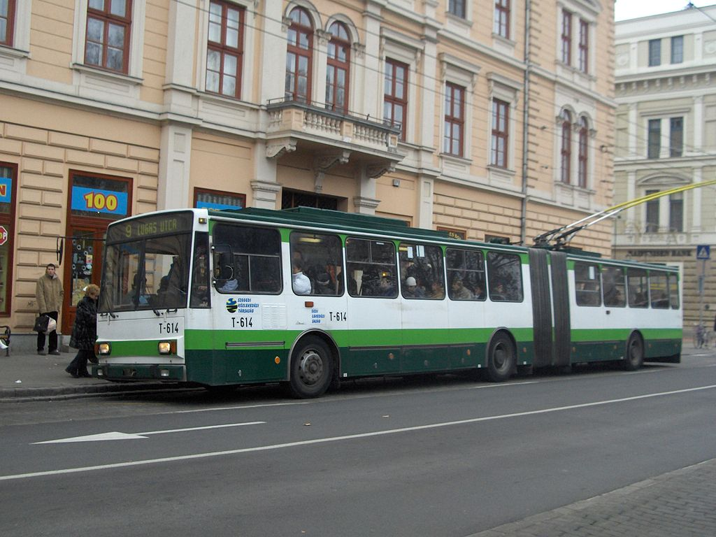 Škoda troli